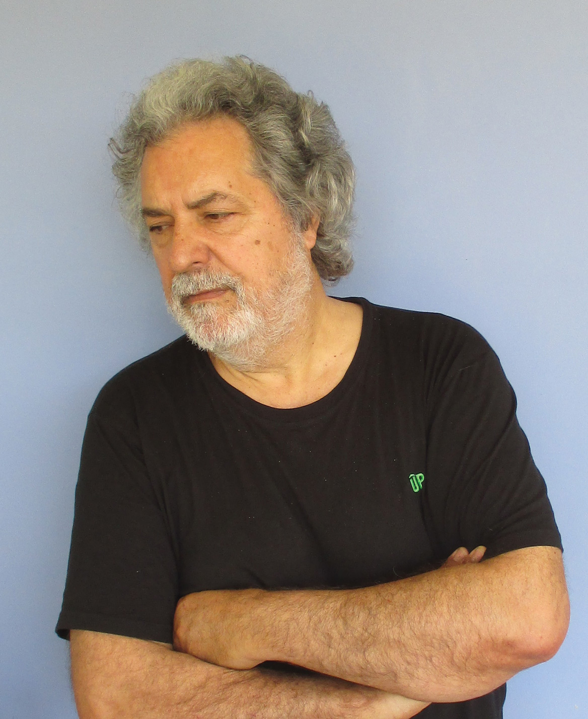 Foto de Requena Nozal en abril de 2015